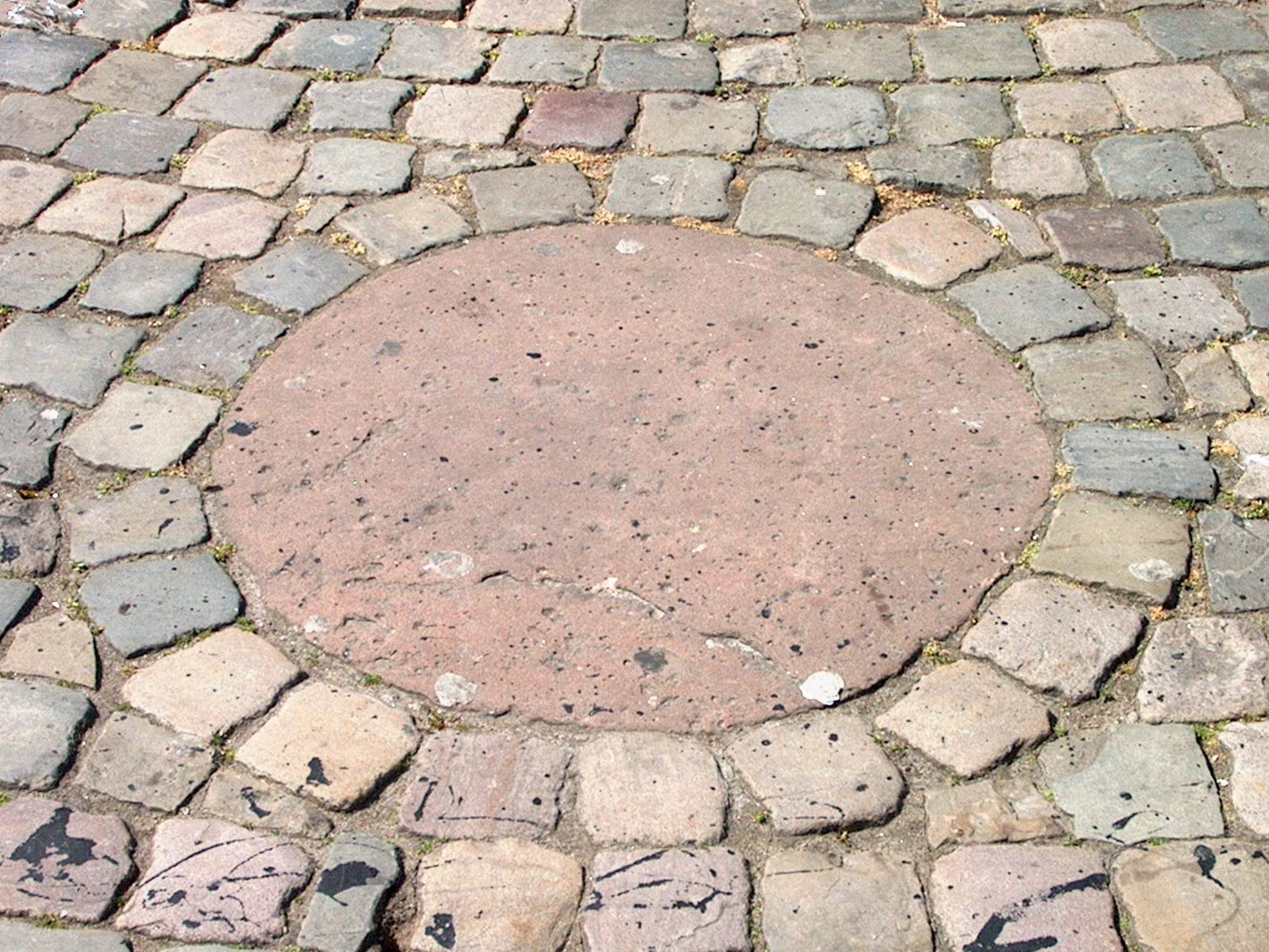 Hoorn, Roode Steen (IM012965)